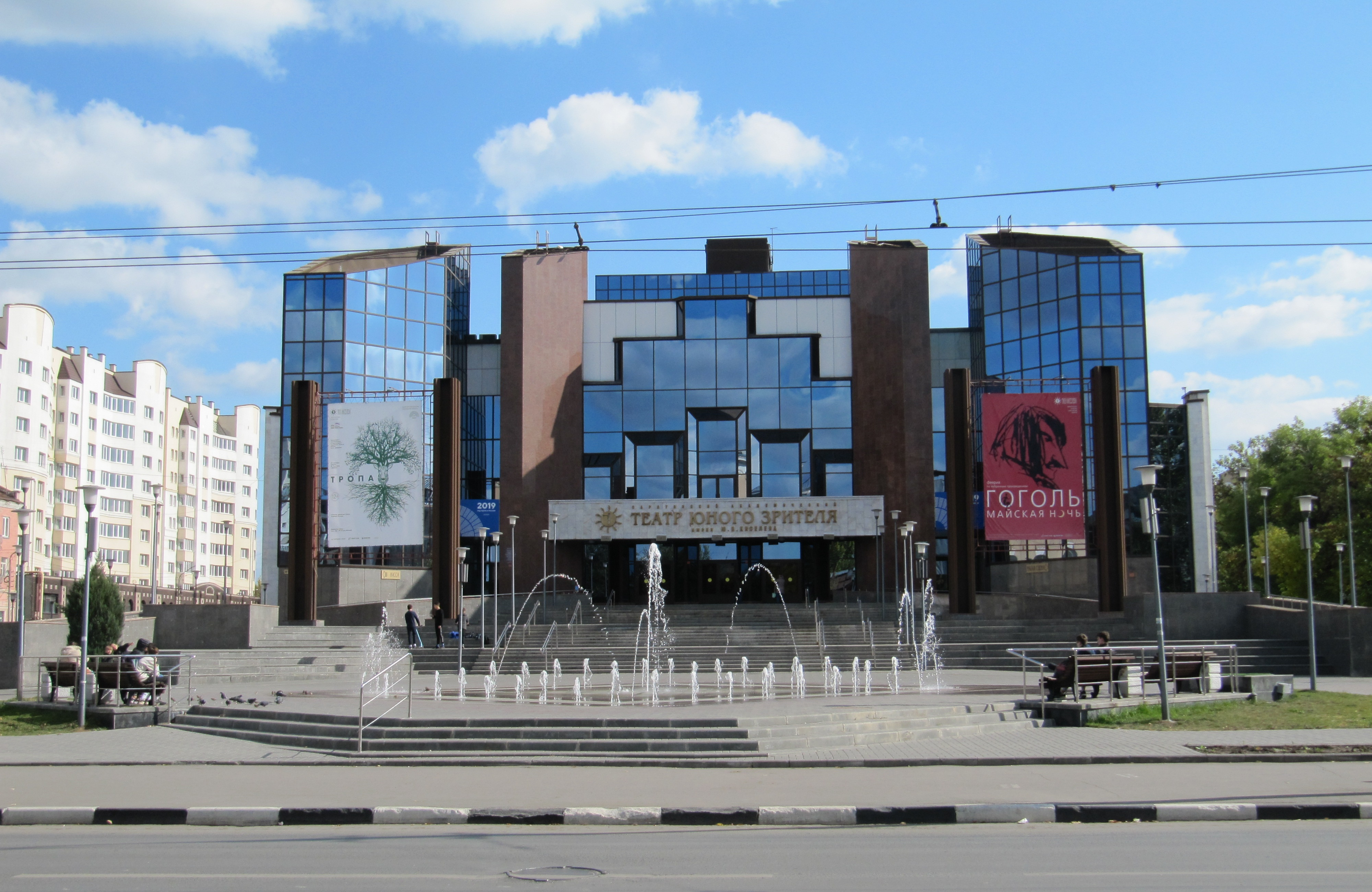 ТЮЗ новый, ул. Киселёва угол Чапаева. Саратов.